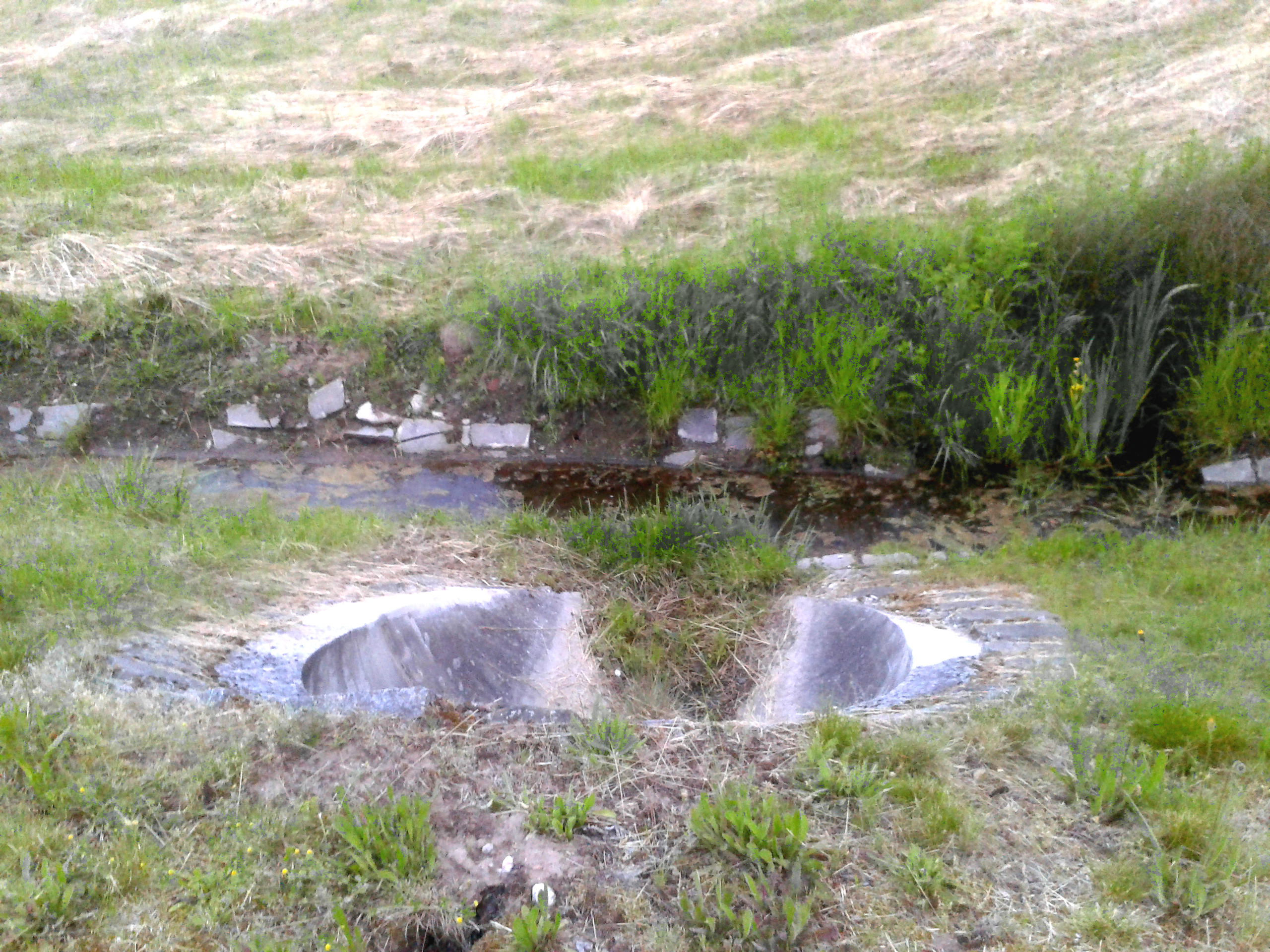 Naturschutzgebiet in Oberweiler-Tiefenbach (RLP) Überlauf am alten Wehr an der Lauter.